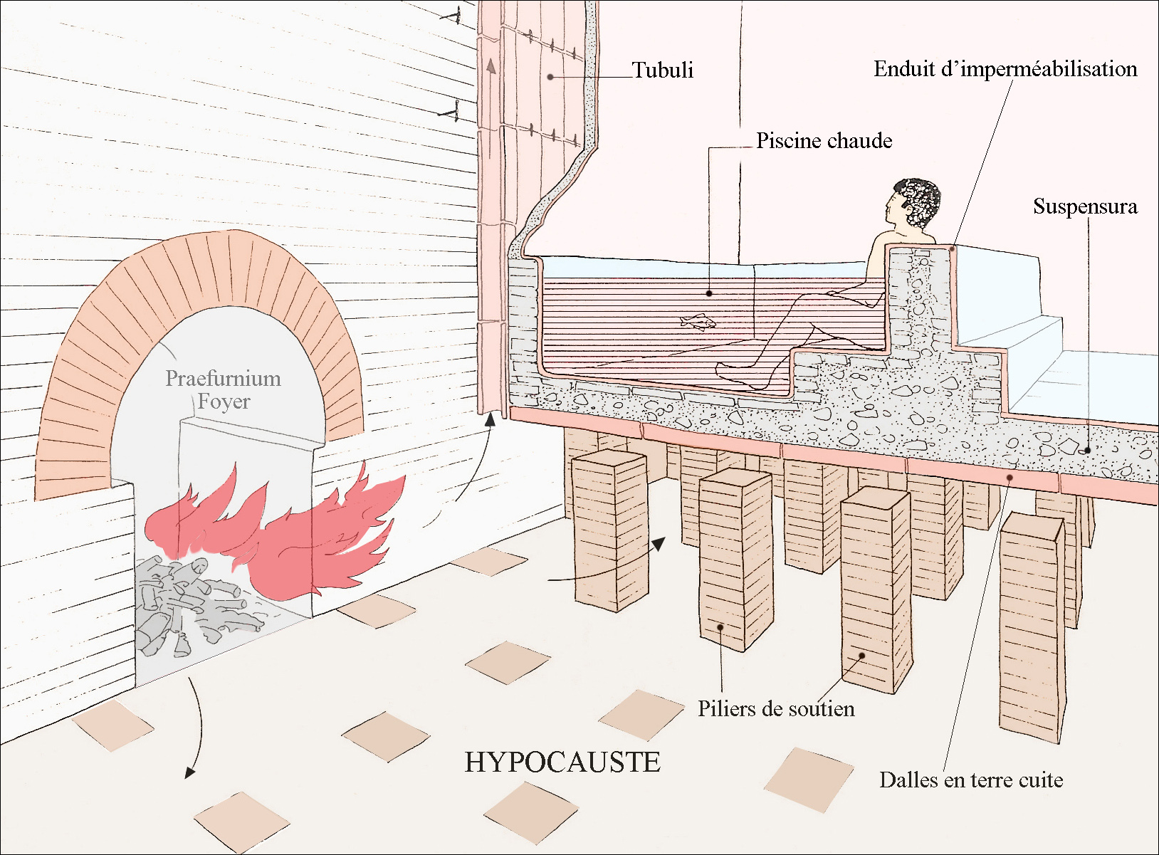 Schéma de fonctionnement d’un hypocauste avec foyer et distribution de la chaleur.